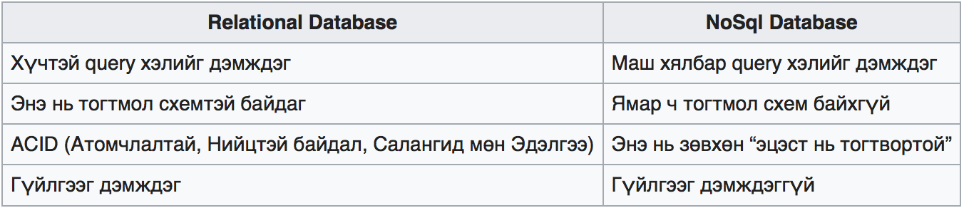 Монгол: Дараах хүснэгдэт NoSQL болон харьцаа өгөгдлийн сангуудын ялгааг жагсаасан.